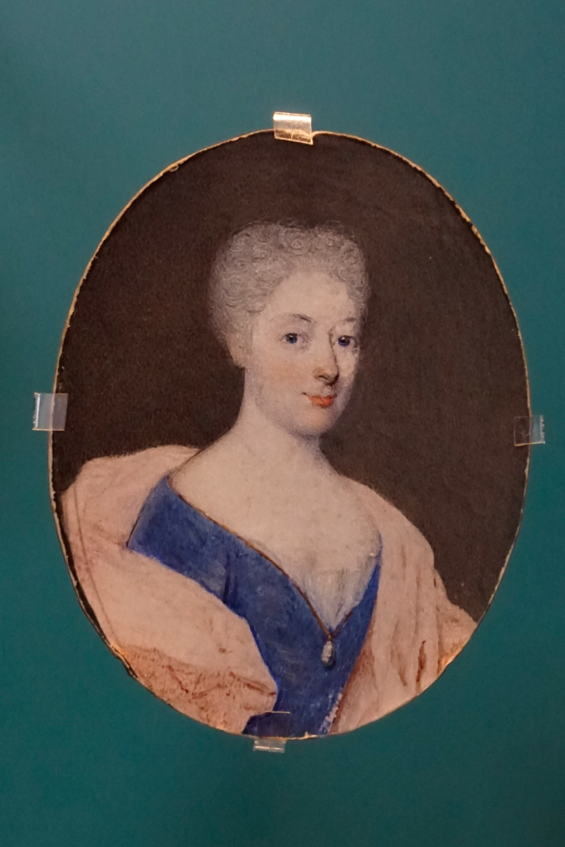 Herzogin Marie-Auguste von Württemberg (1706-1756)